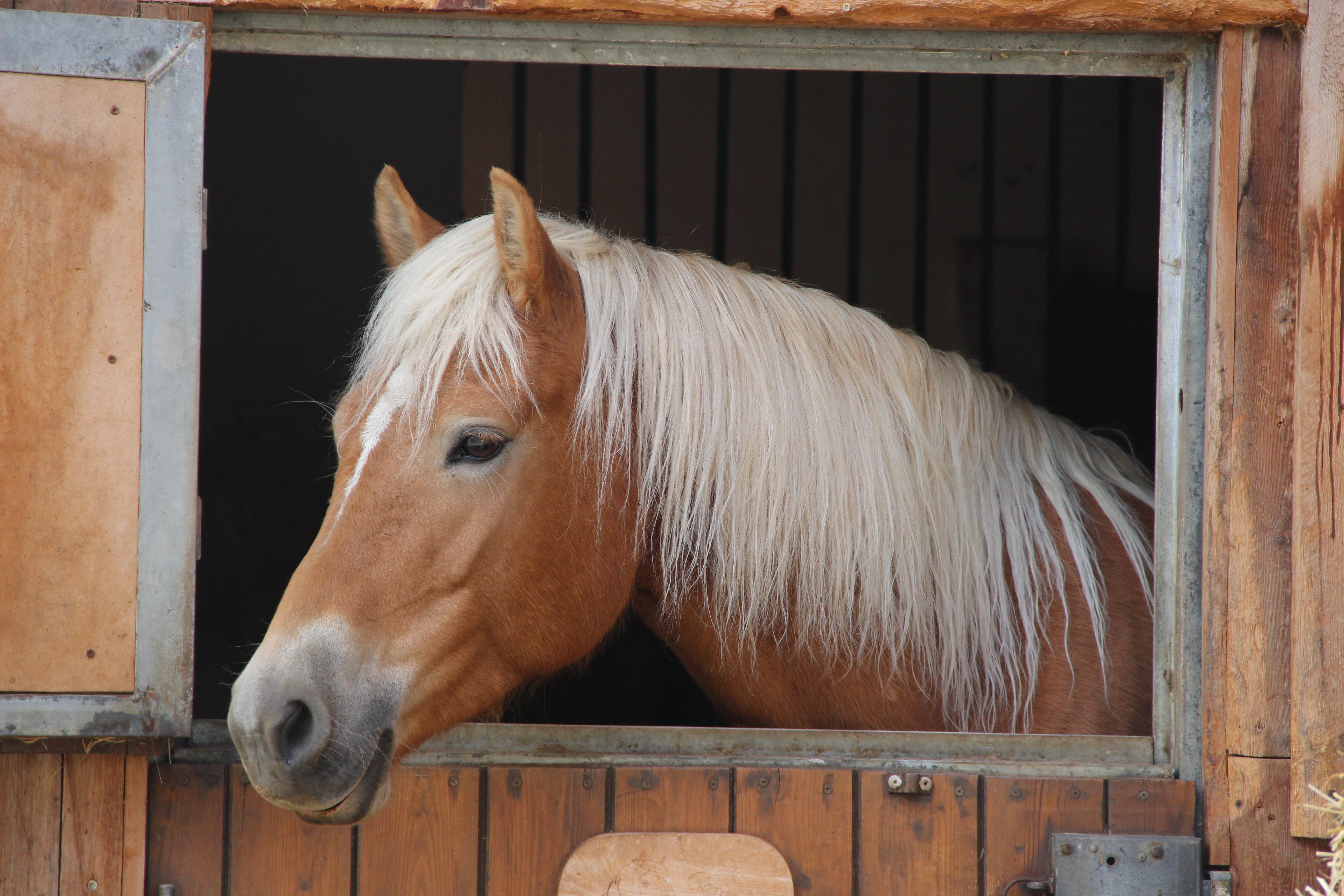 Haflinger in Tösens, Tirol